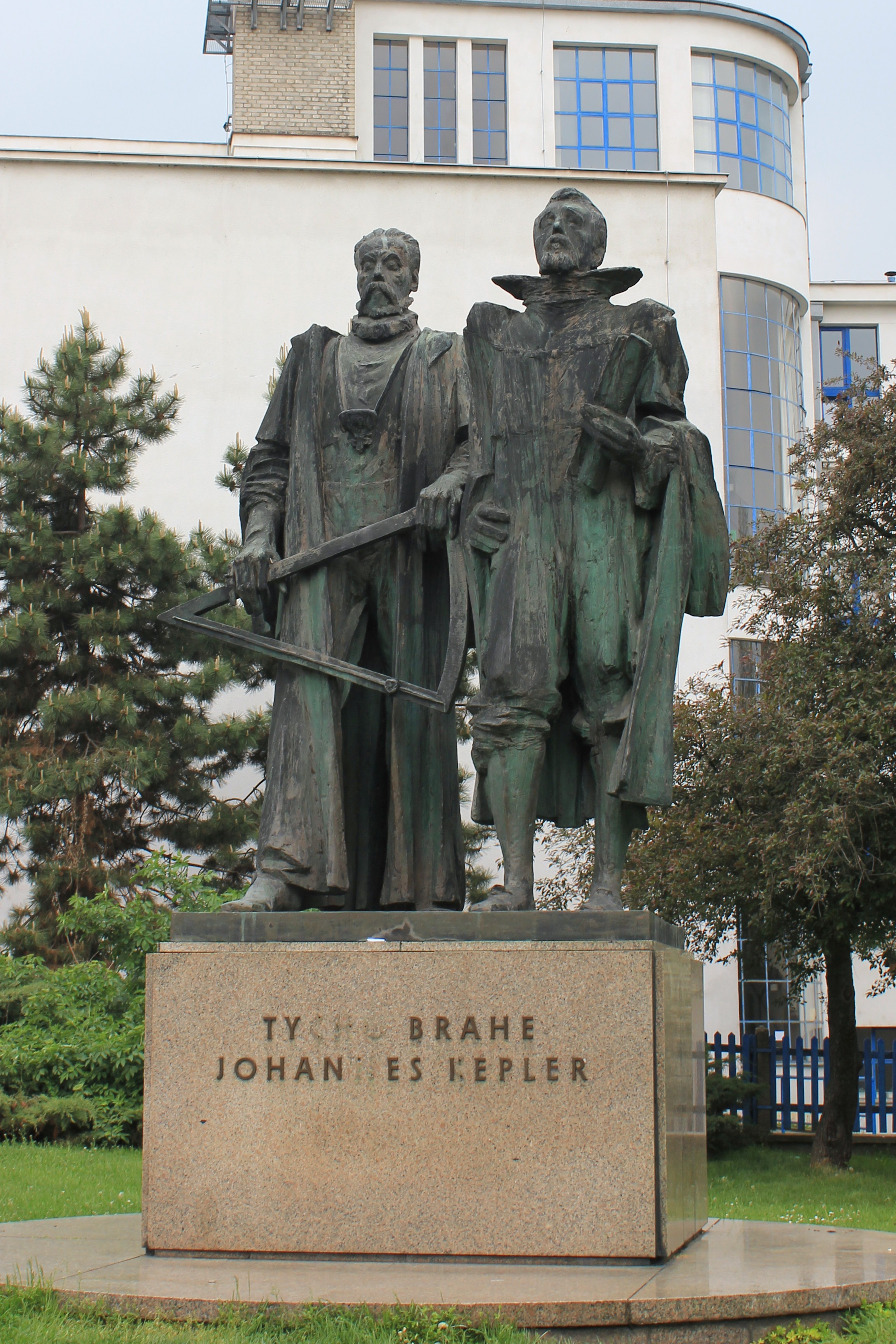 Tycho Brahe og Johannes Kepler